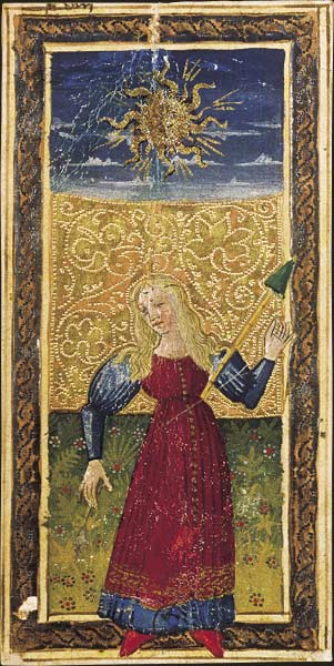 Charles VI (or Gringonneur) Deck; Le tarot dit de Charles VI